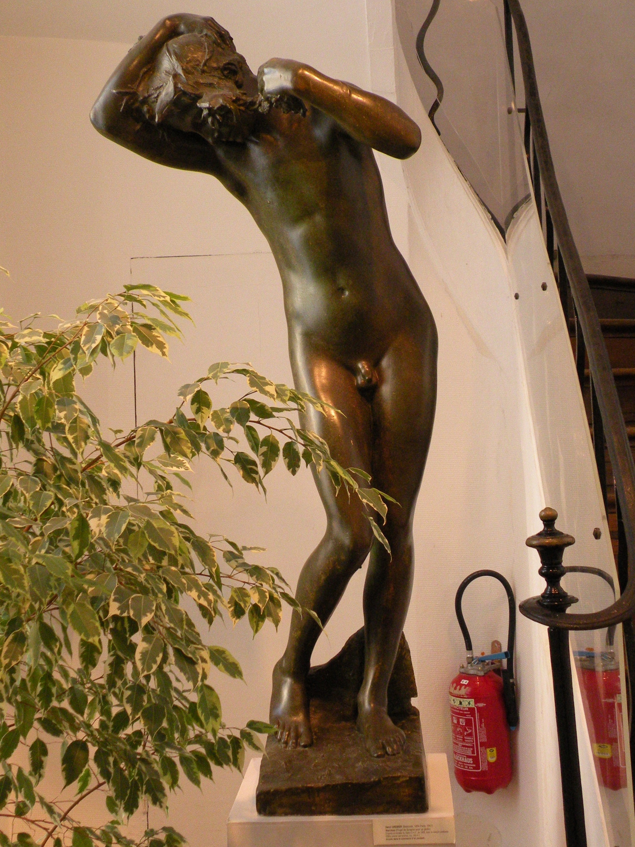 statue de narcisse au Musée départemental de l'Oise - Plâtre patiné, Henri Greber (1856-1941)